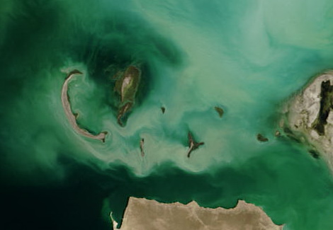 17 мая 2002